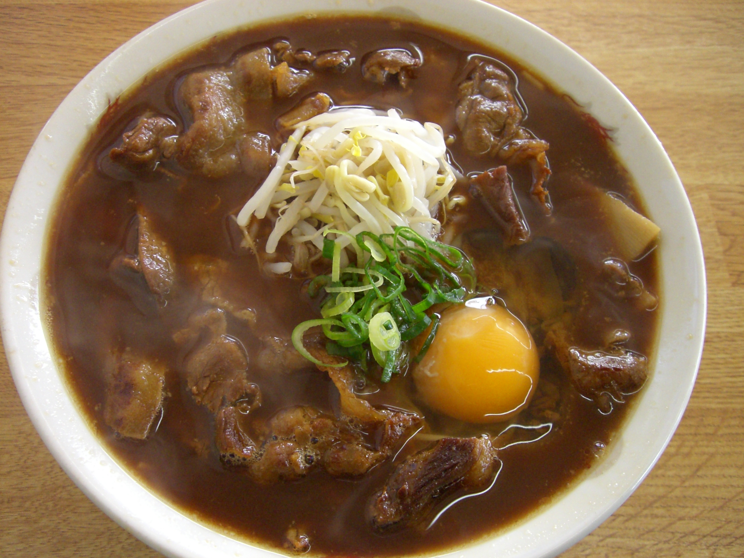 徳島ラーメン